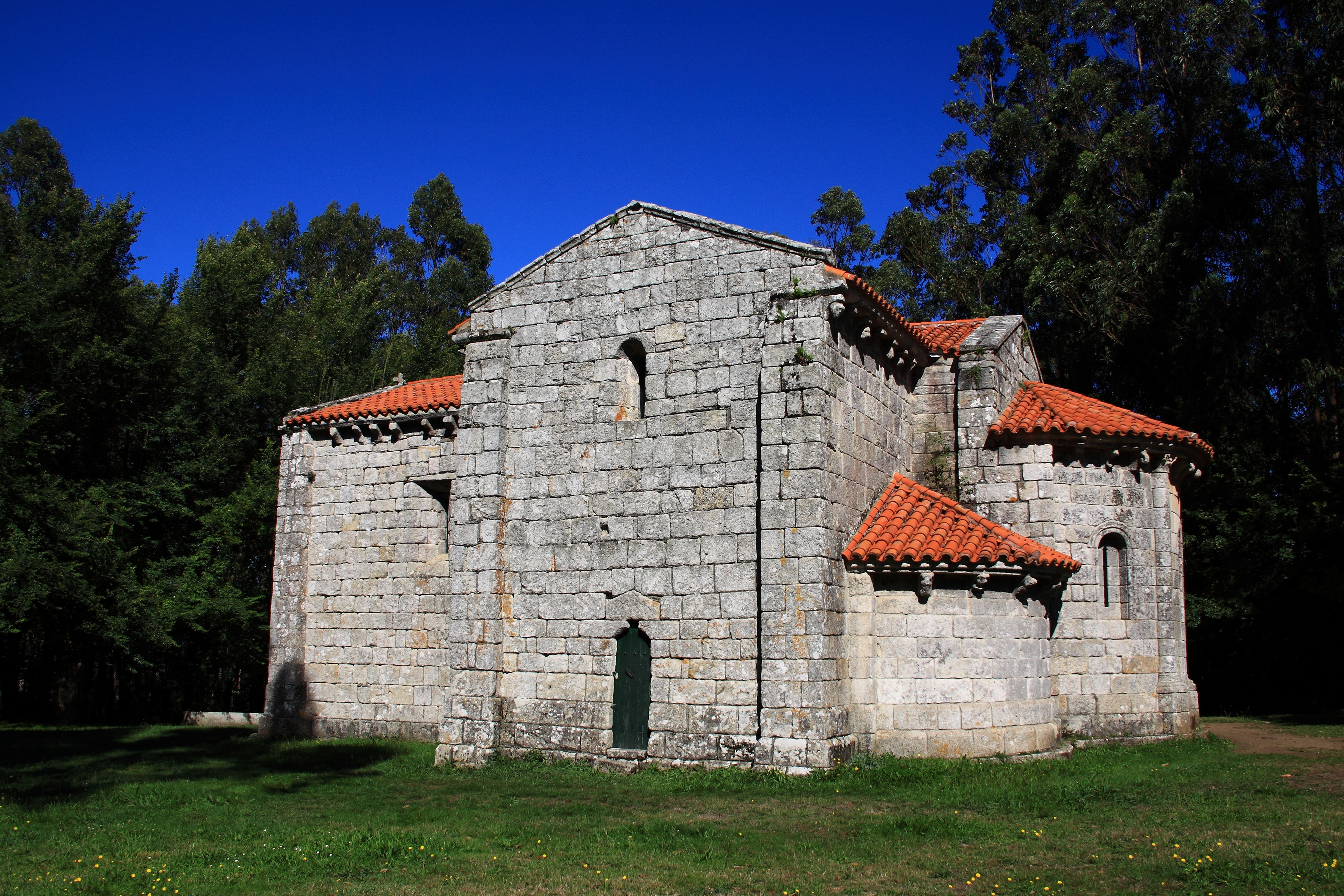 Iglesia de San Miguel de Breamo, Pontedeume